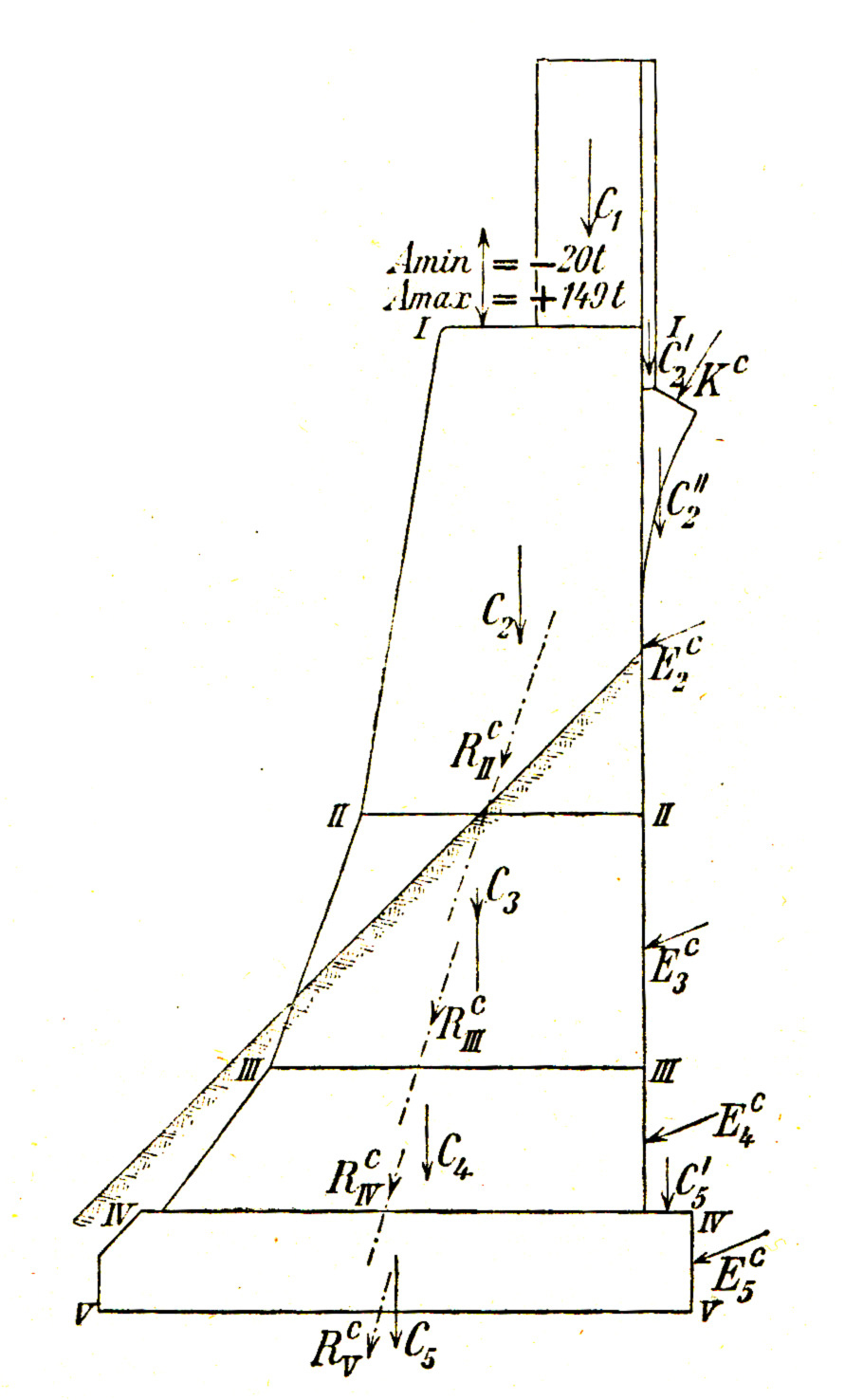 Berlin - Stössenseebrücke, Schnitt durch den Landpfeiler